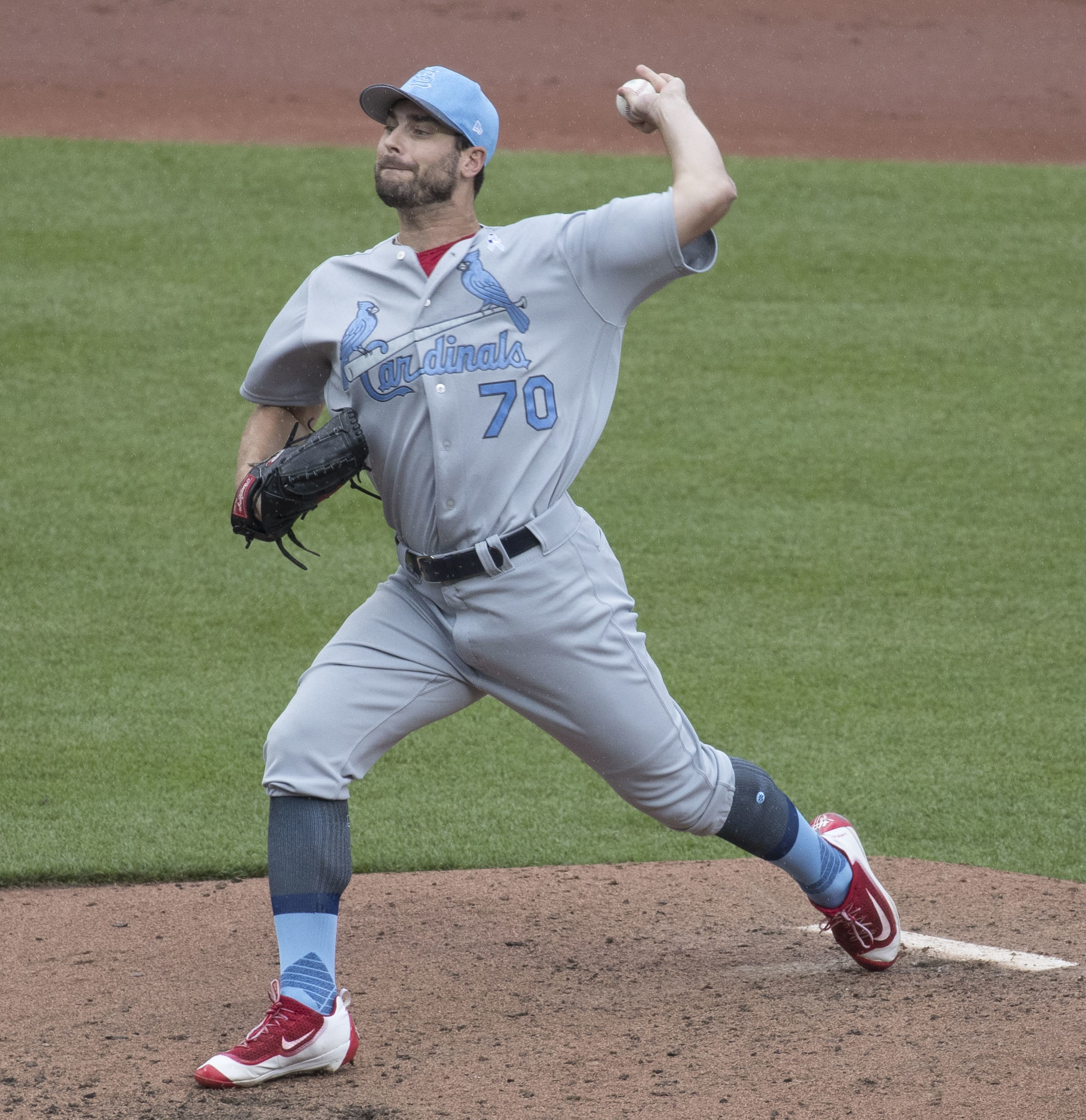 Cardinals at Orioles 6/17/17